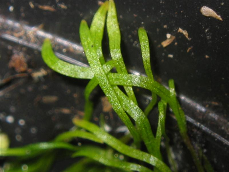 Utricularia subulata's leaves.